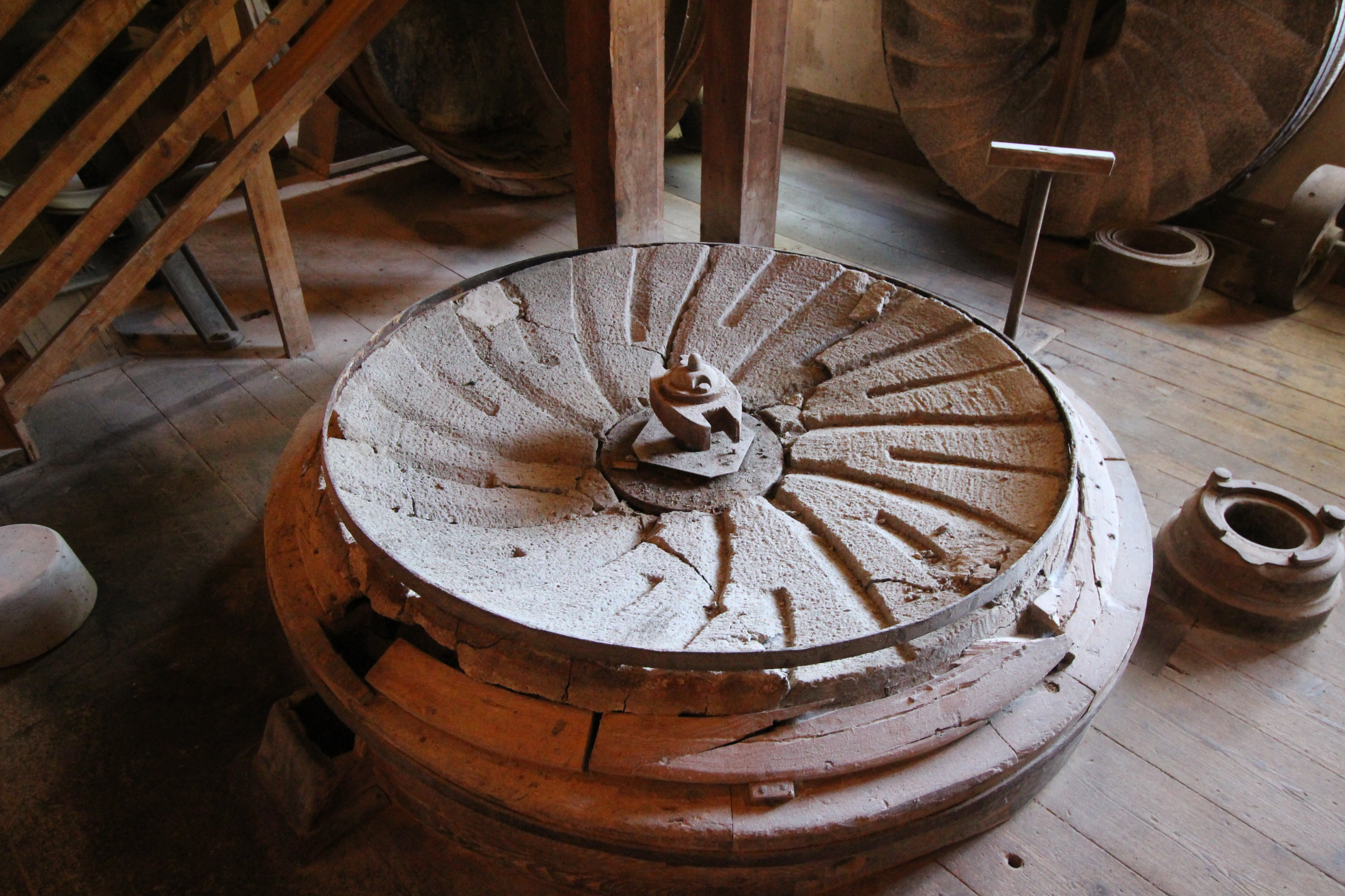 Kvarnvikens kvarn, interiörbild från 10 september 2017, kvarnsten